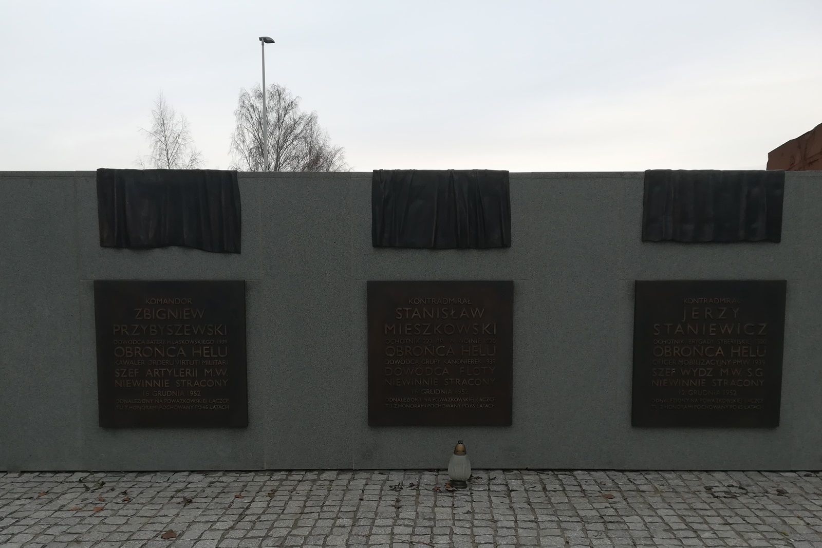 Cmentarz Marynarki Wojennej_Kwatera Pamięci_05